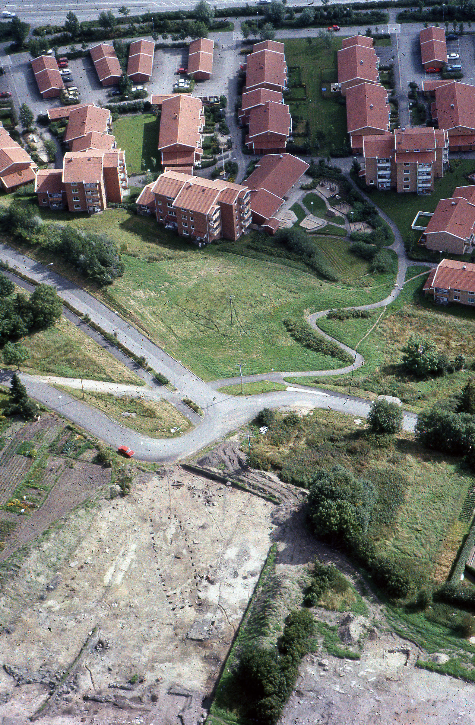 VArlahallen. Groparna i vilka de takbärande timret stått i var så stora att de även syns på håll.